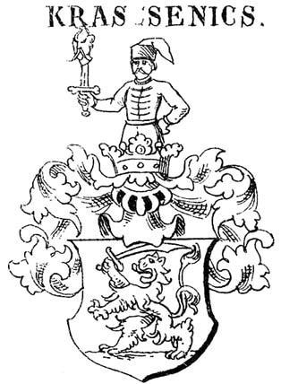 A töböréthei Krascsenics család címere